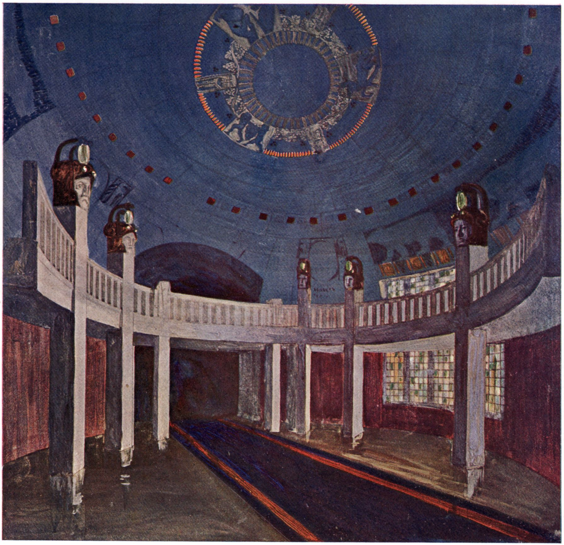 Berlin - Weinhaus Rheingold, Entwurf des Blauen Kuppelsaals von Bruno Schmitz